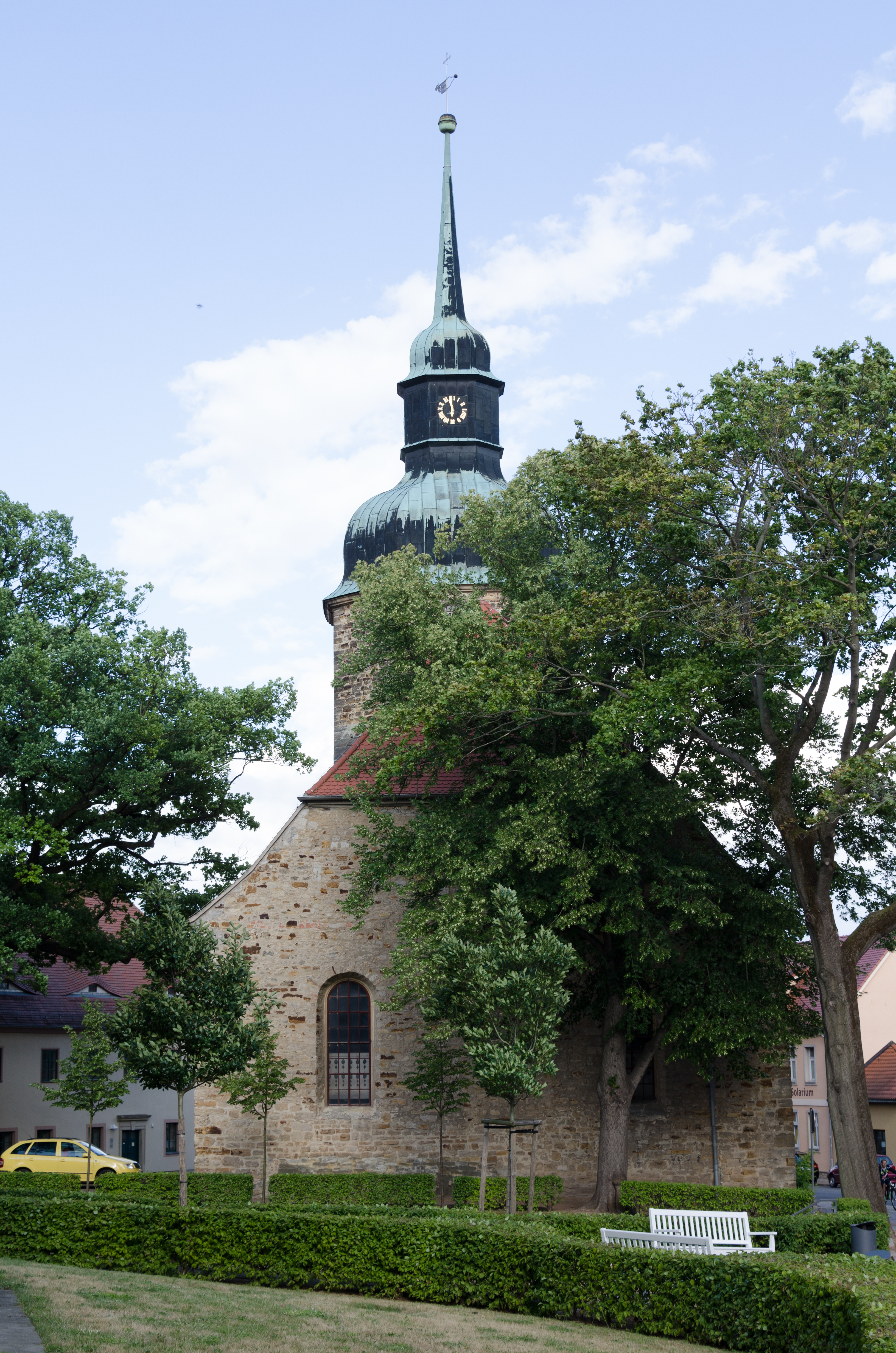 Bad Lauchstädt, Kirche St. Fabia, Sebastian, Valentin und Cyriakus